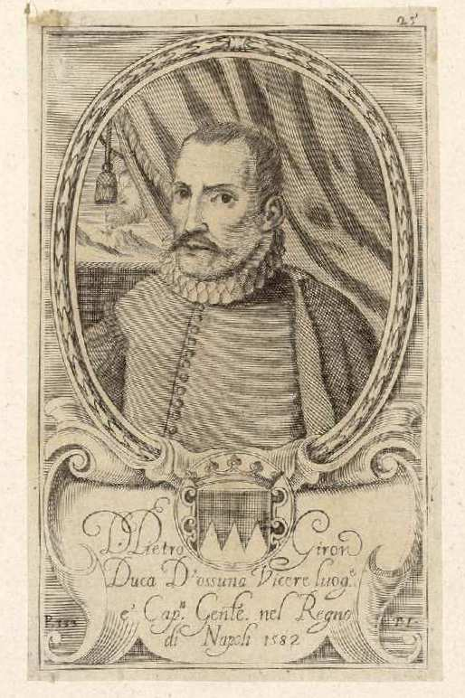 Pedro Téllez Girón. Grabado calcográfico anónimo recogido en Teatro eroico, e politico de'governi de'Vicere del Regno de Napoli, de Domenico Antonio Parrino, Nápoles, 1692-1695. Biblioteca Nacional de España